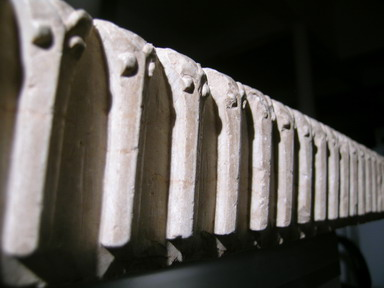 Bainon museum